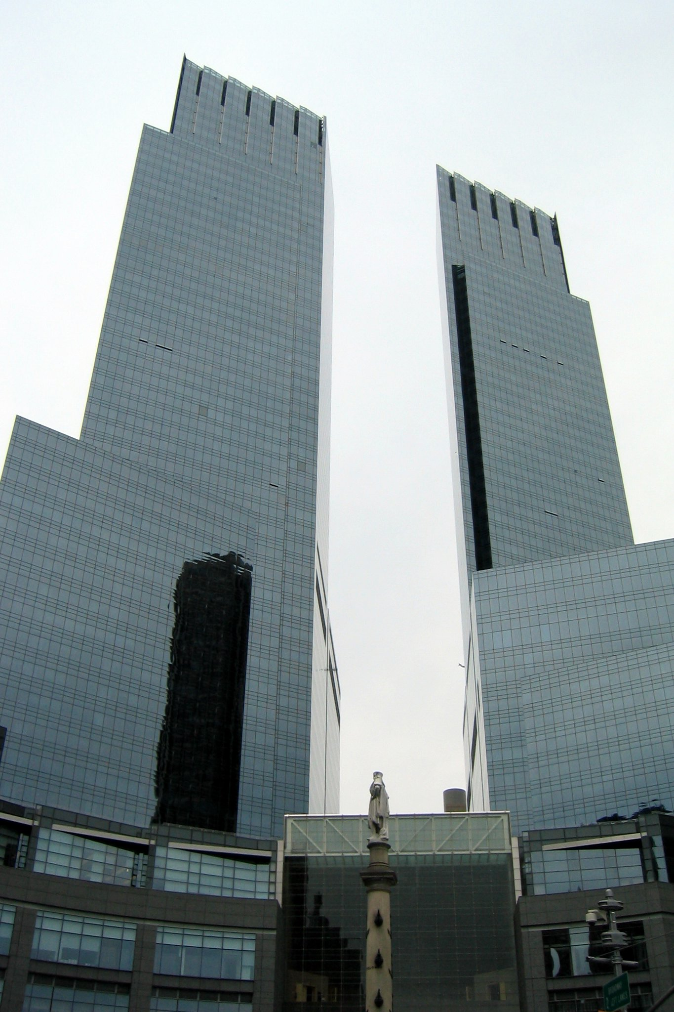 Hoofdkantoor van Time Warner in New York City, New York.